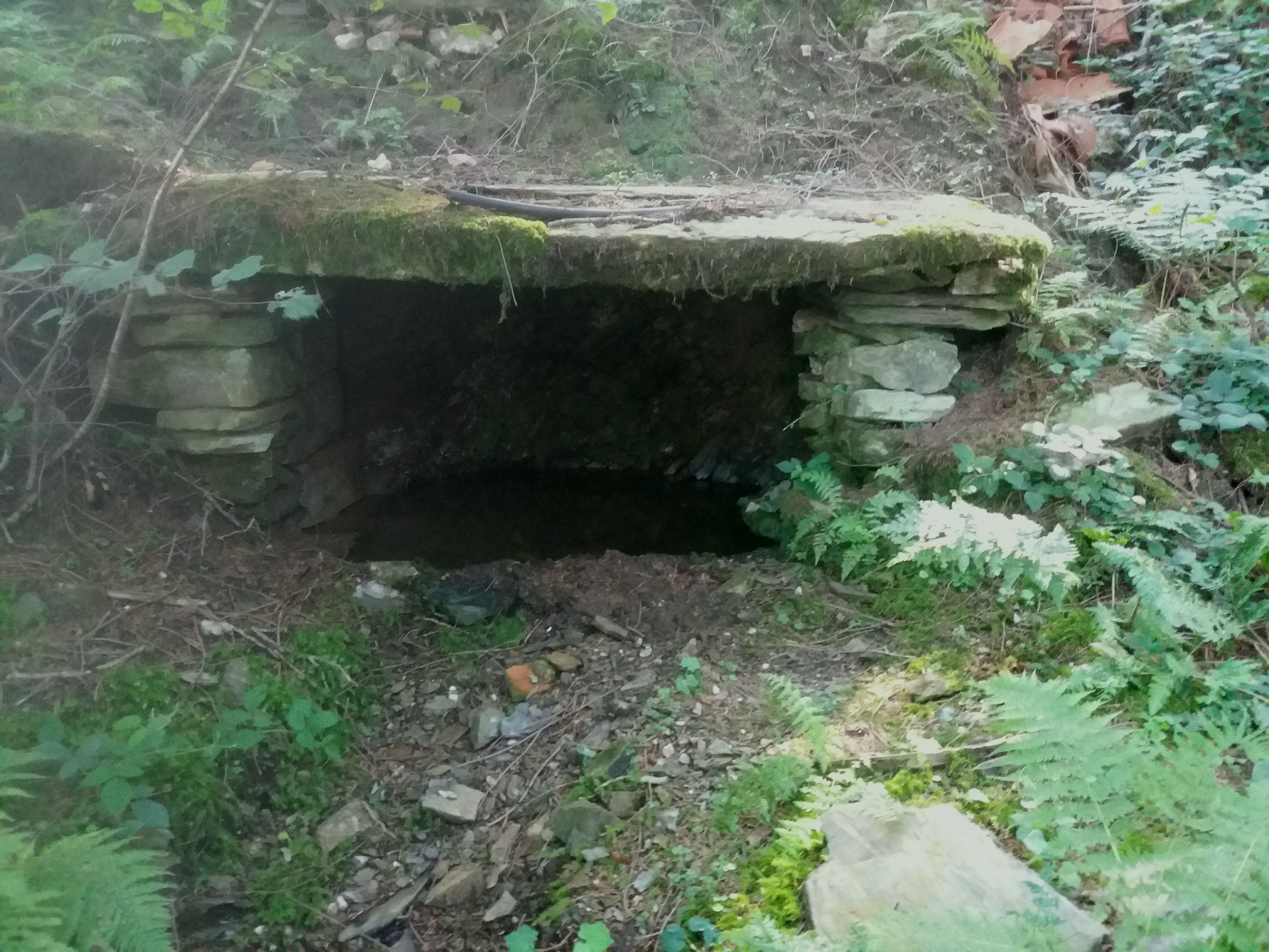 La source de la Cesse (reference).